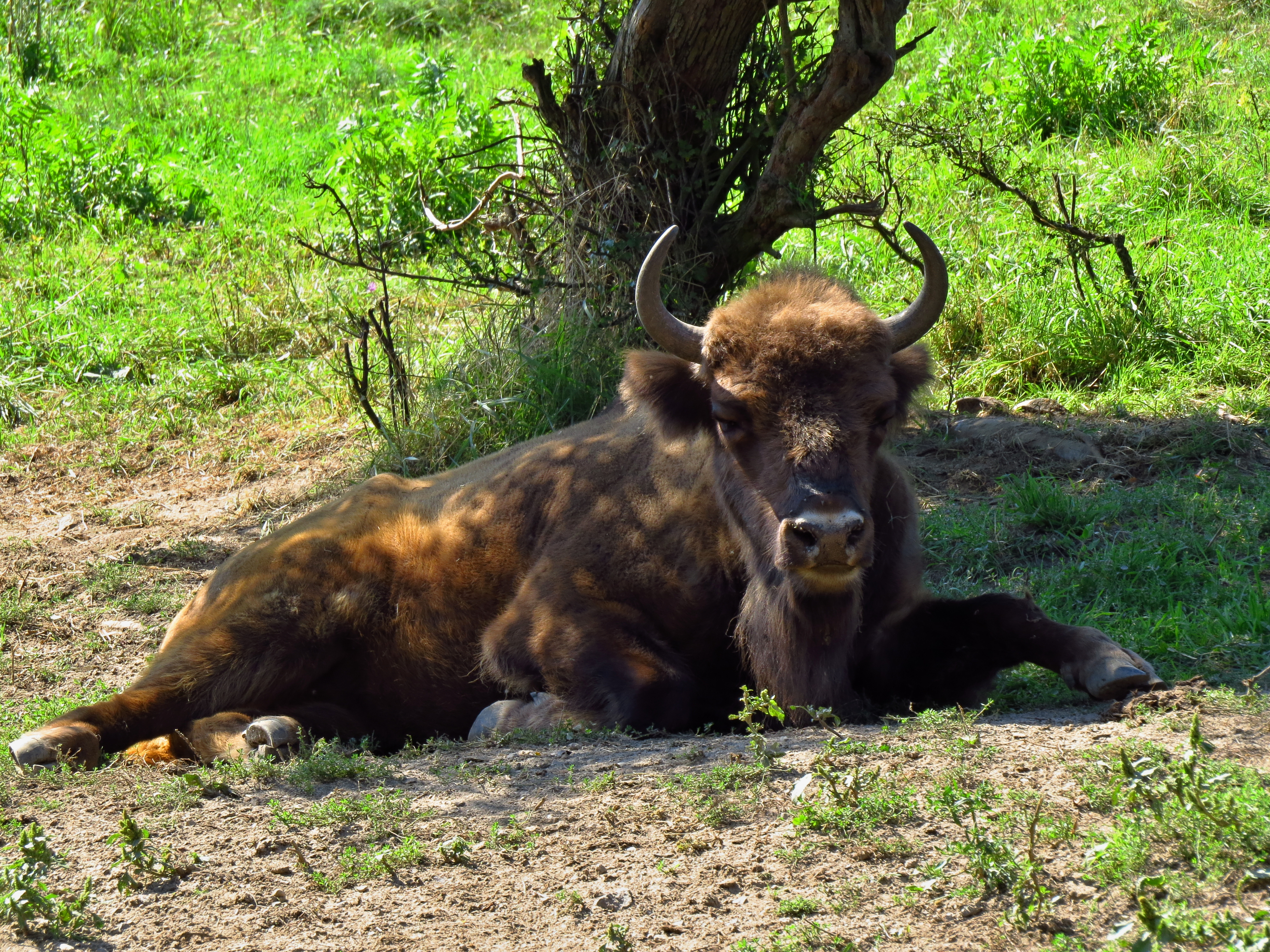 Zubr evropský